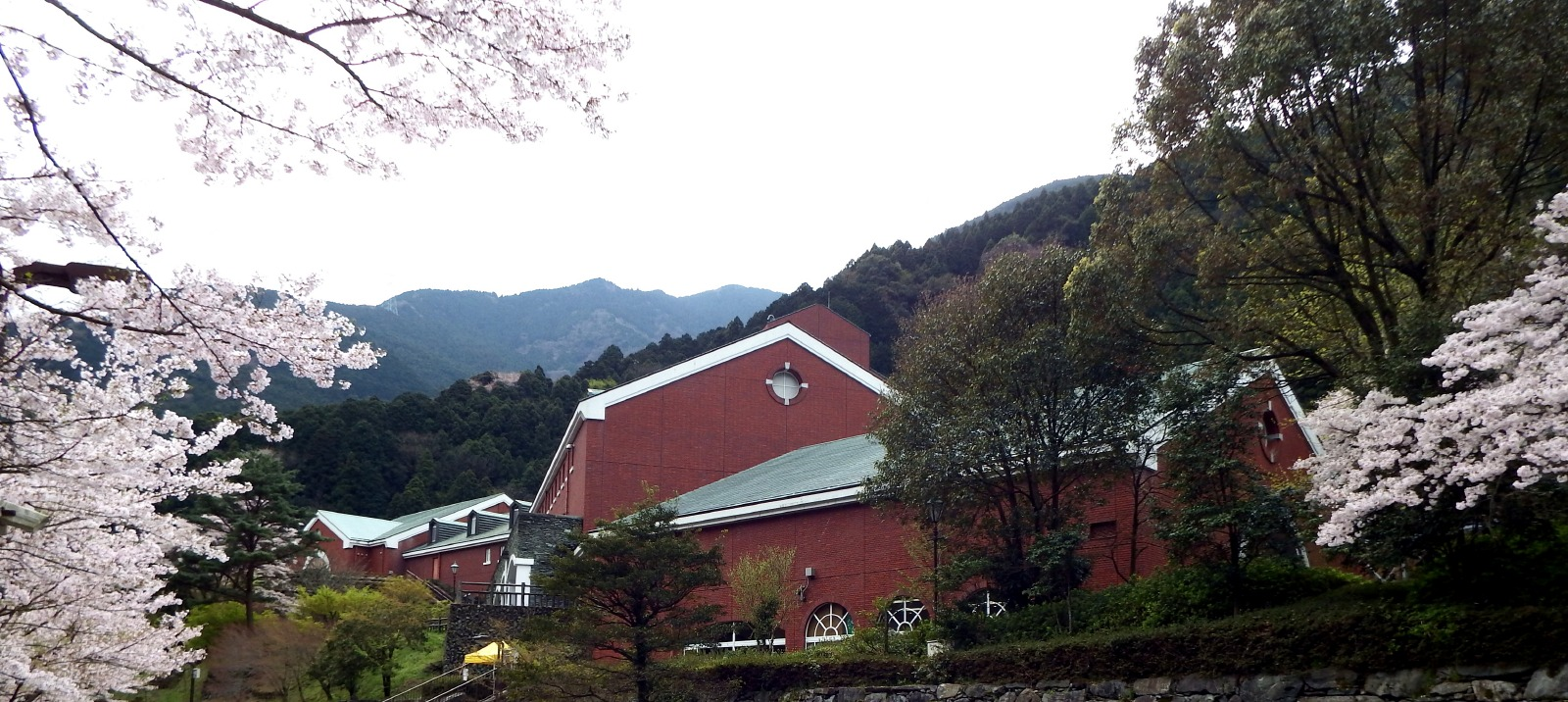 マイントピア別子本館